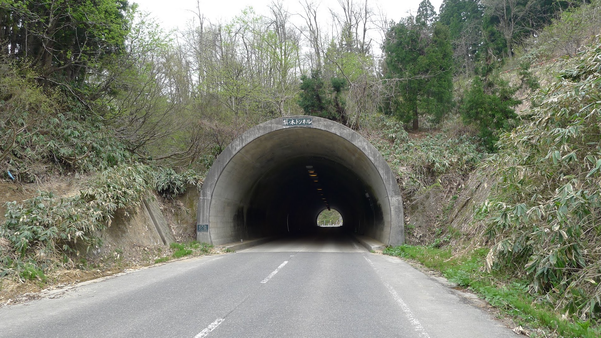 新潟県道9号長岡栃尾巻線 梨ノ木トンネル（新潟県長岡市九川）